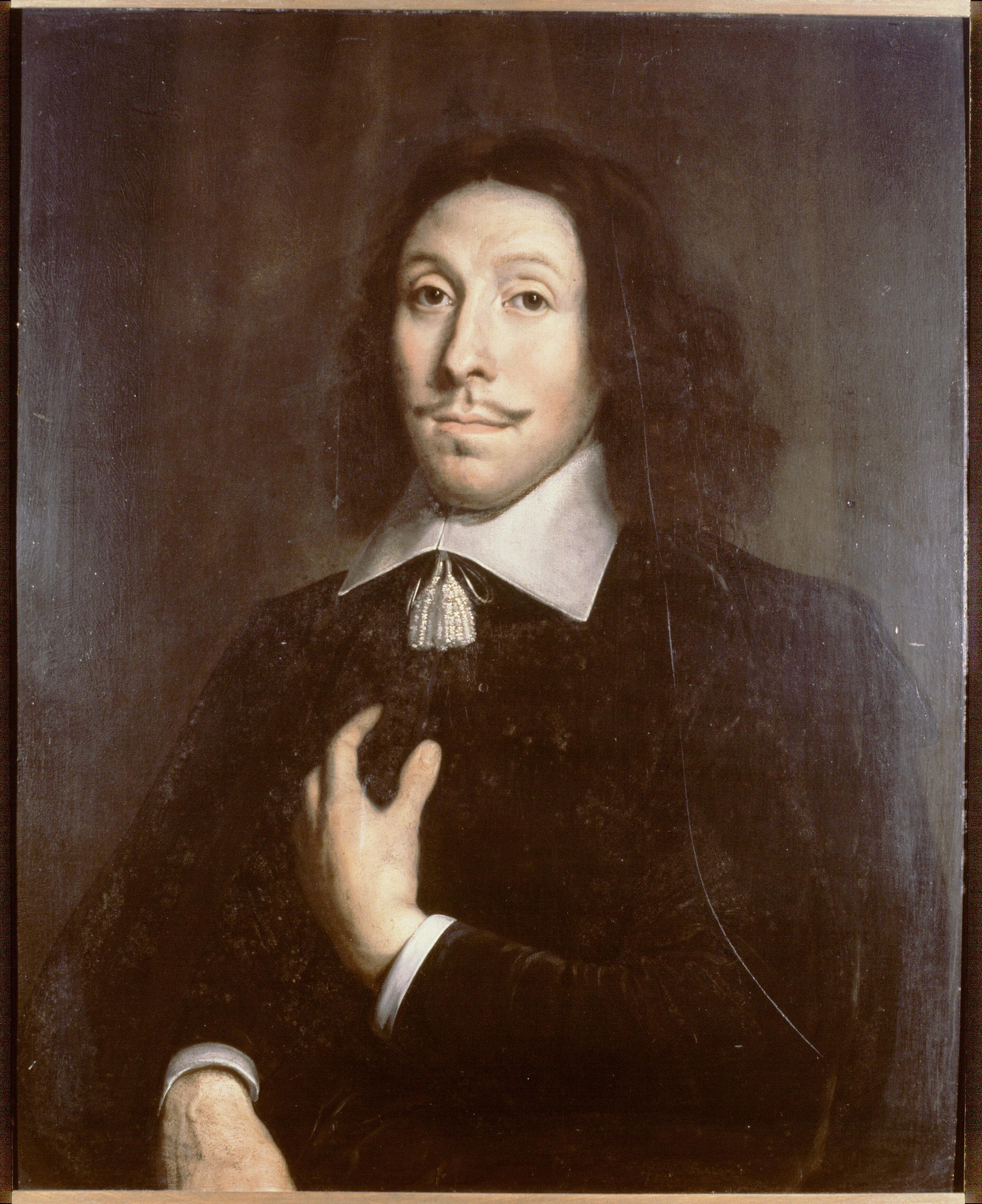 Detail van een portret van Pieter Boddaert (1620-1670)